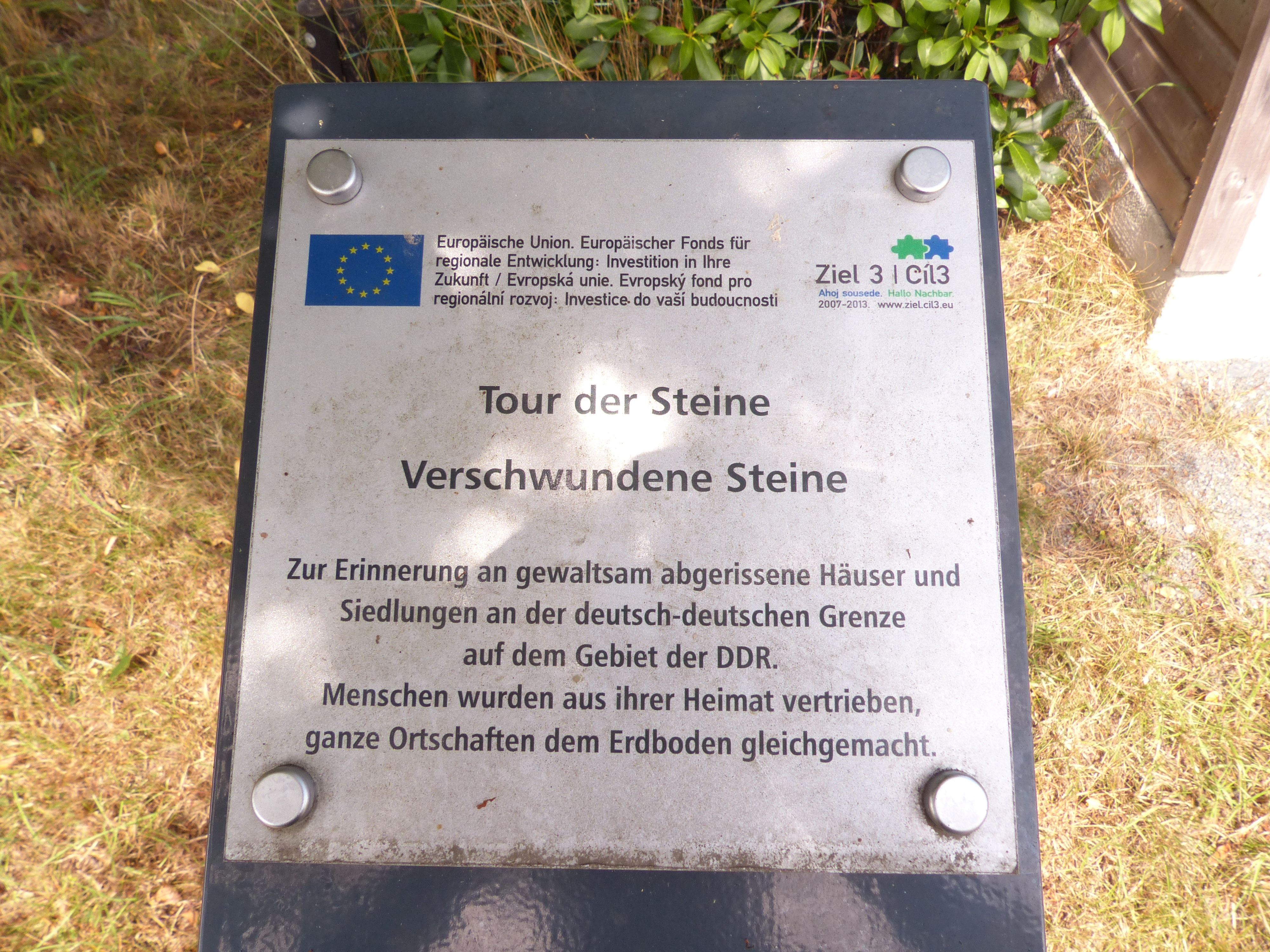 Bushäuschen am Standort der Wüstung Hammerleithen als Erinnerungskultur, der Ort verschwand zur Sicherung der DDR Grenze